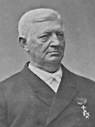 Friedrich Rudolph Neumüller